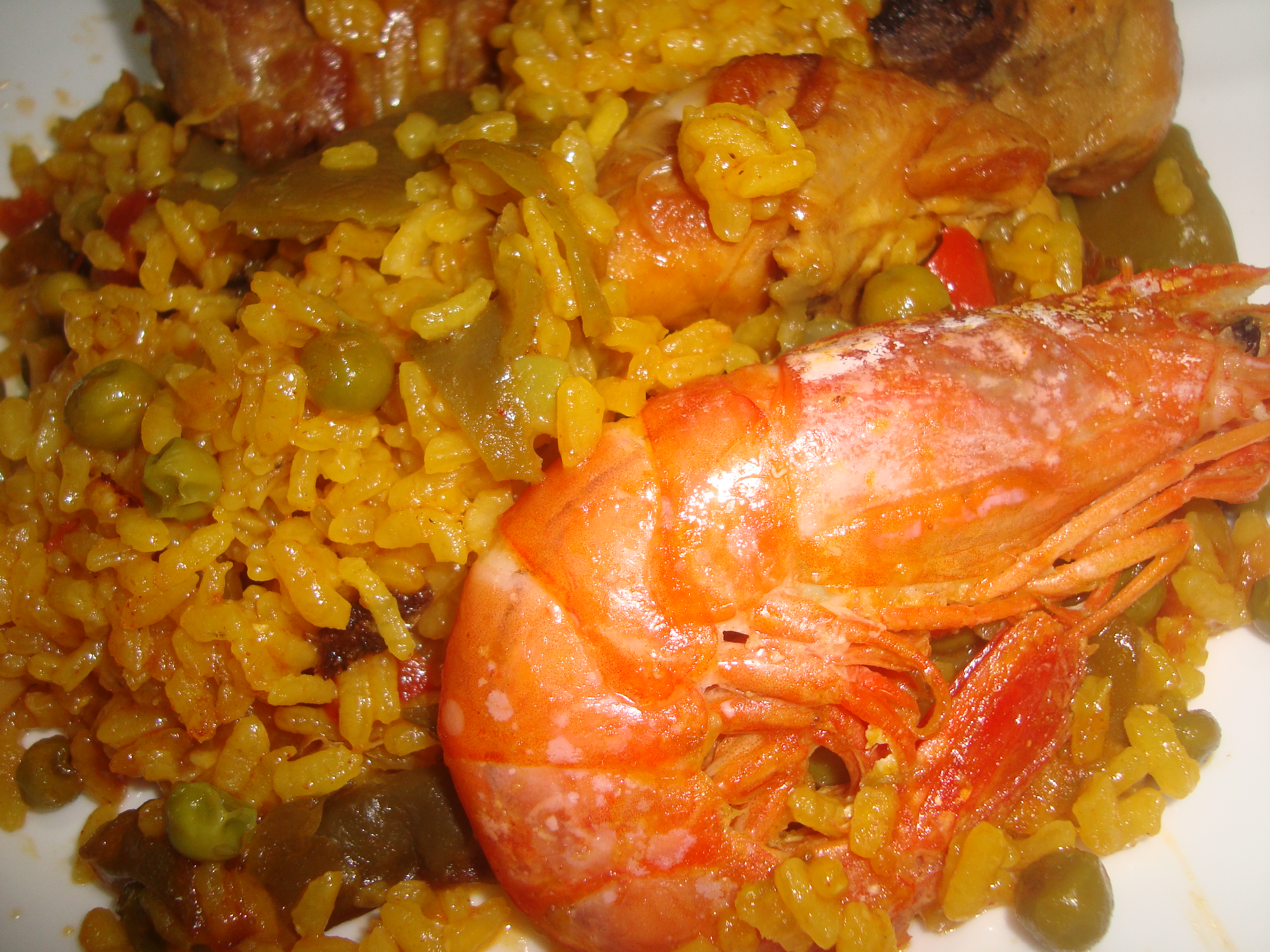 Plato de paella (Comunidad Valenciana)